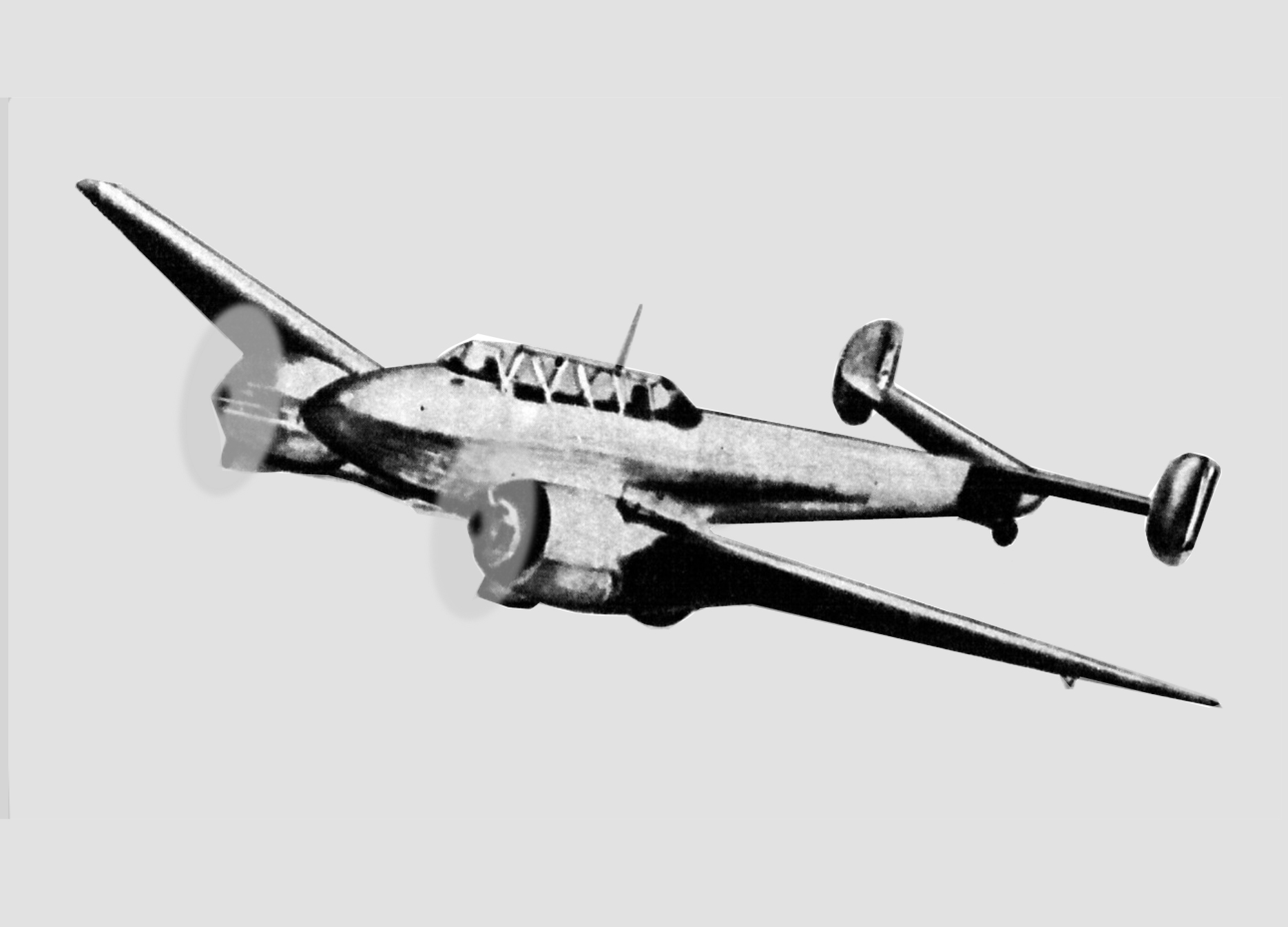 Francuski samolot rozpoznawczo-bombowy Potez 633B2.